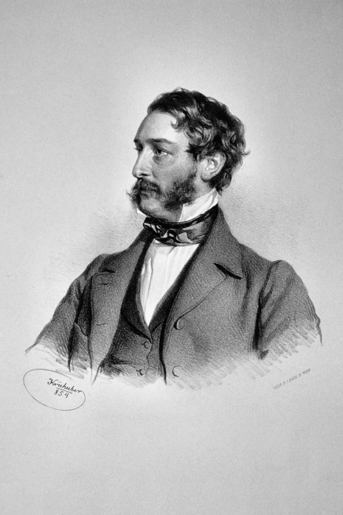 Christian Graf Kinsky (1822-1894), Landmarschall von Niederösterreich, Geheimrat, Kämmerer, Mitglied des Herrenhauses, Gutsbesitzer. Lithographie von Josef Kriehuber, 1854